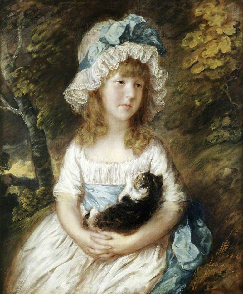 Miss Brummell, 1782, 76.2×63.5 см, Кенвуд-хаус, Лондон